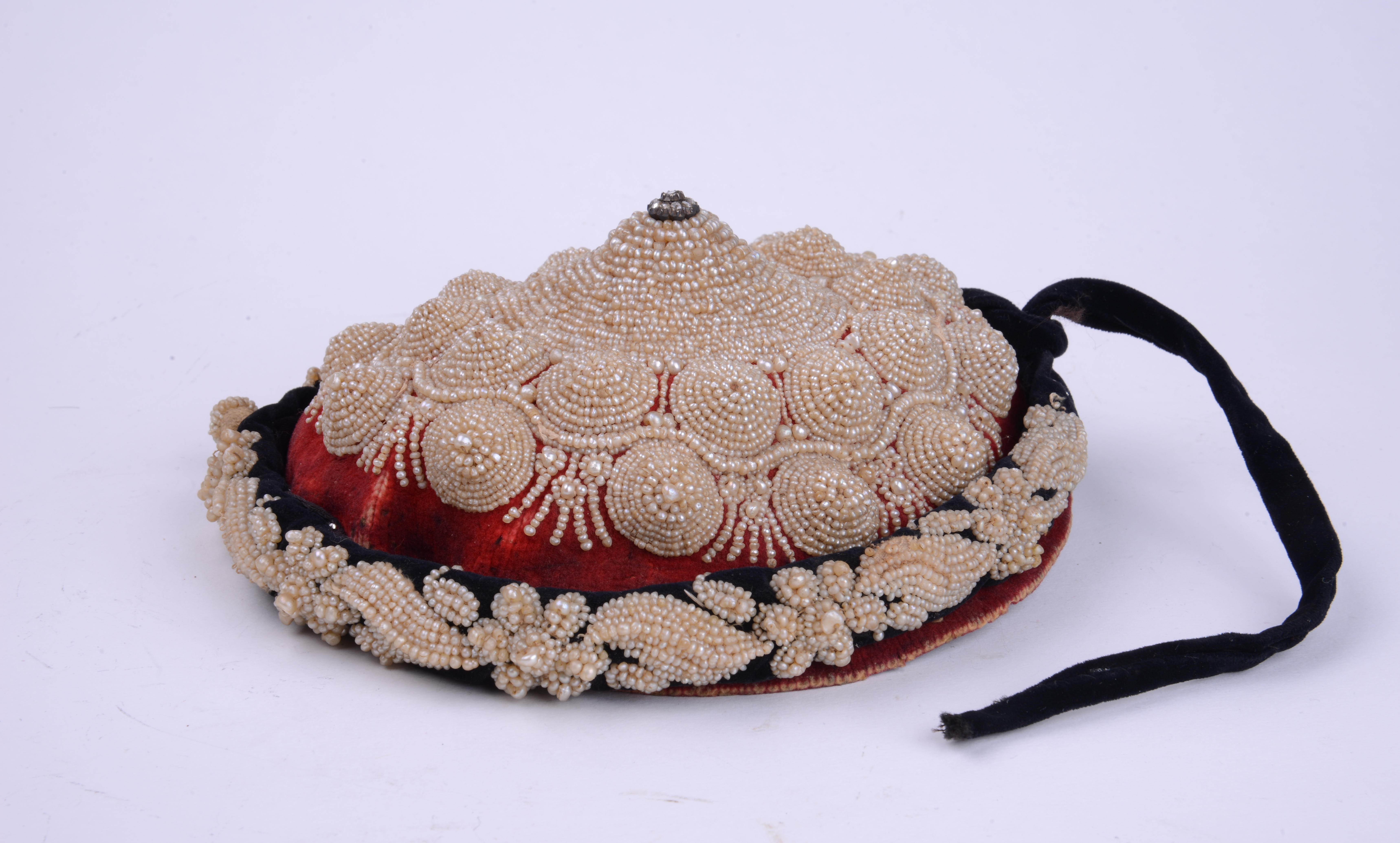 Srpski (latinica): Nakit za glavu.